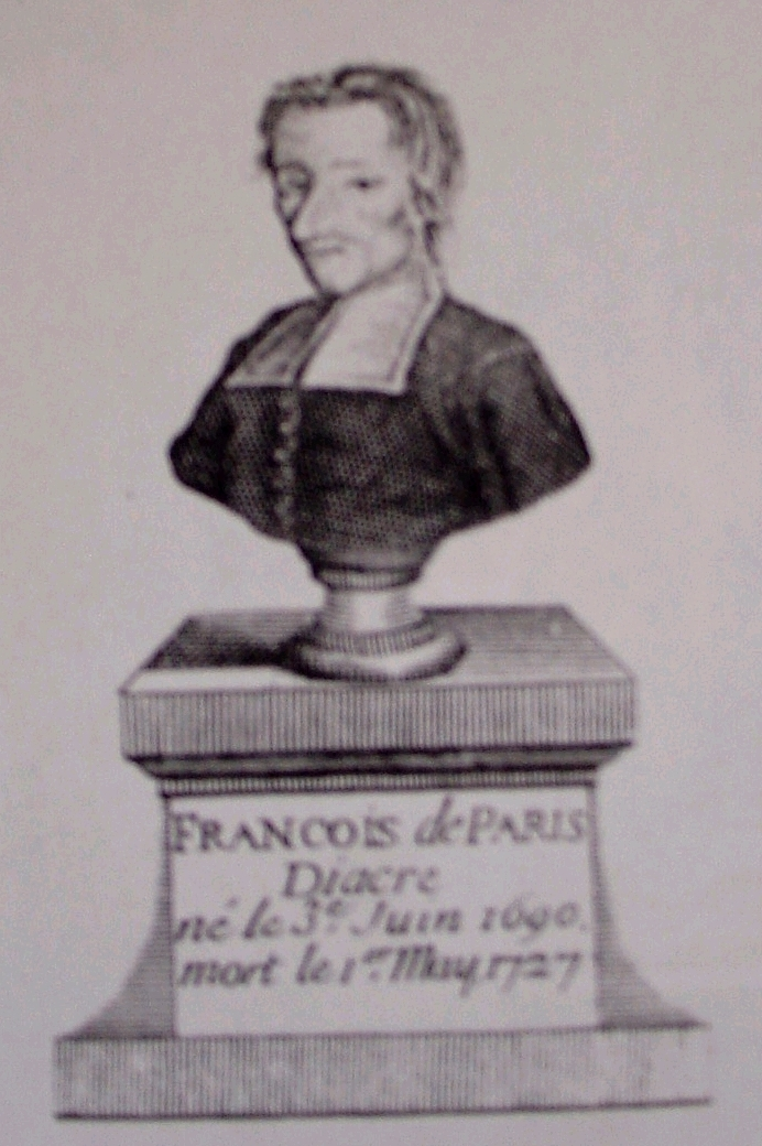 Gravure d'un buste du diacre Pâris